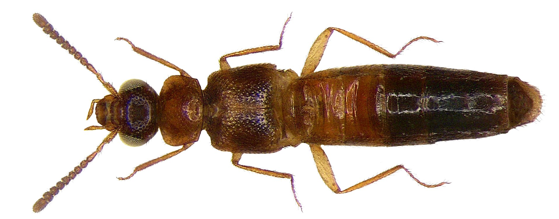 Familie: Staphylinidae Groesse: 4,5 mm Fundort: Kenia, Tsavo National Park, Voi Lodge leg. U.Schmidt, 1991; det. R.Pace, 2008 Paratypus Photo: U.Schmidt, 2008